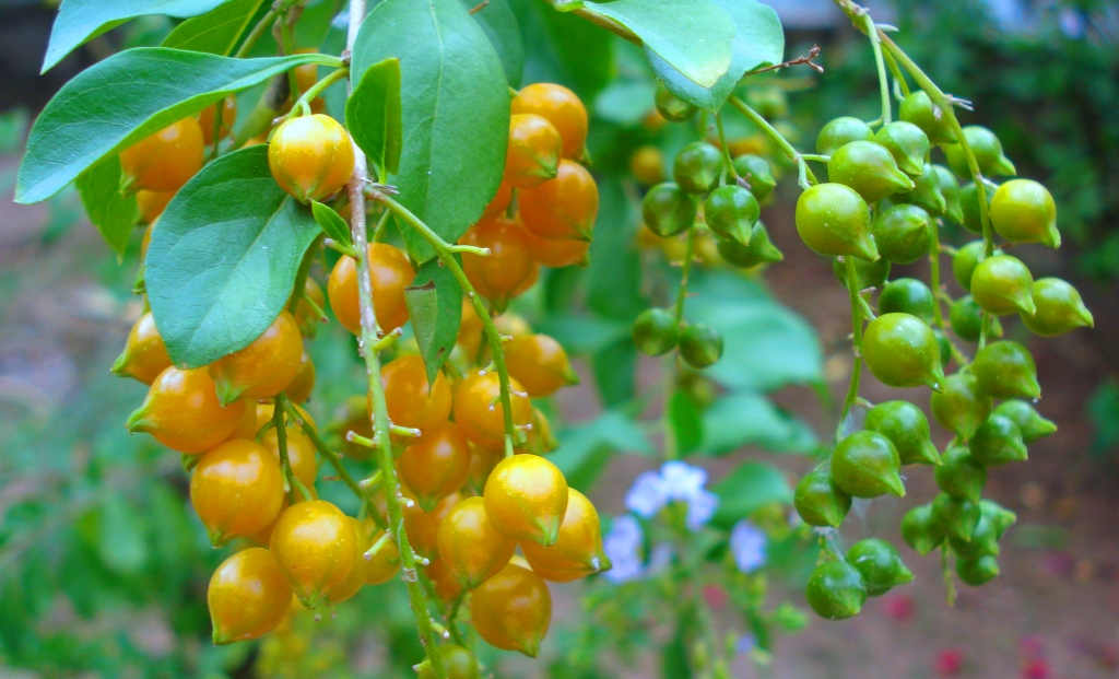 മാണിക്യചെമ്പഴുക്ക